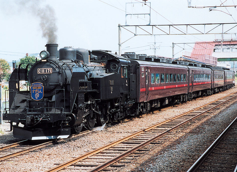 JR北海道 C11 171けん引 「SLすずらん号」